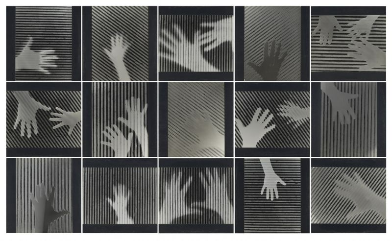 Manos